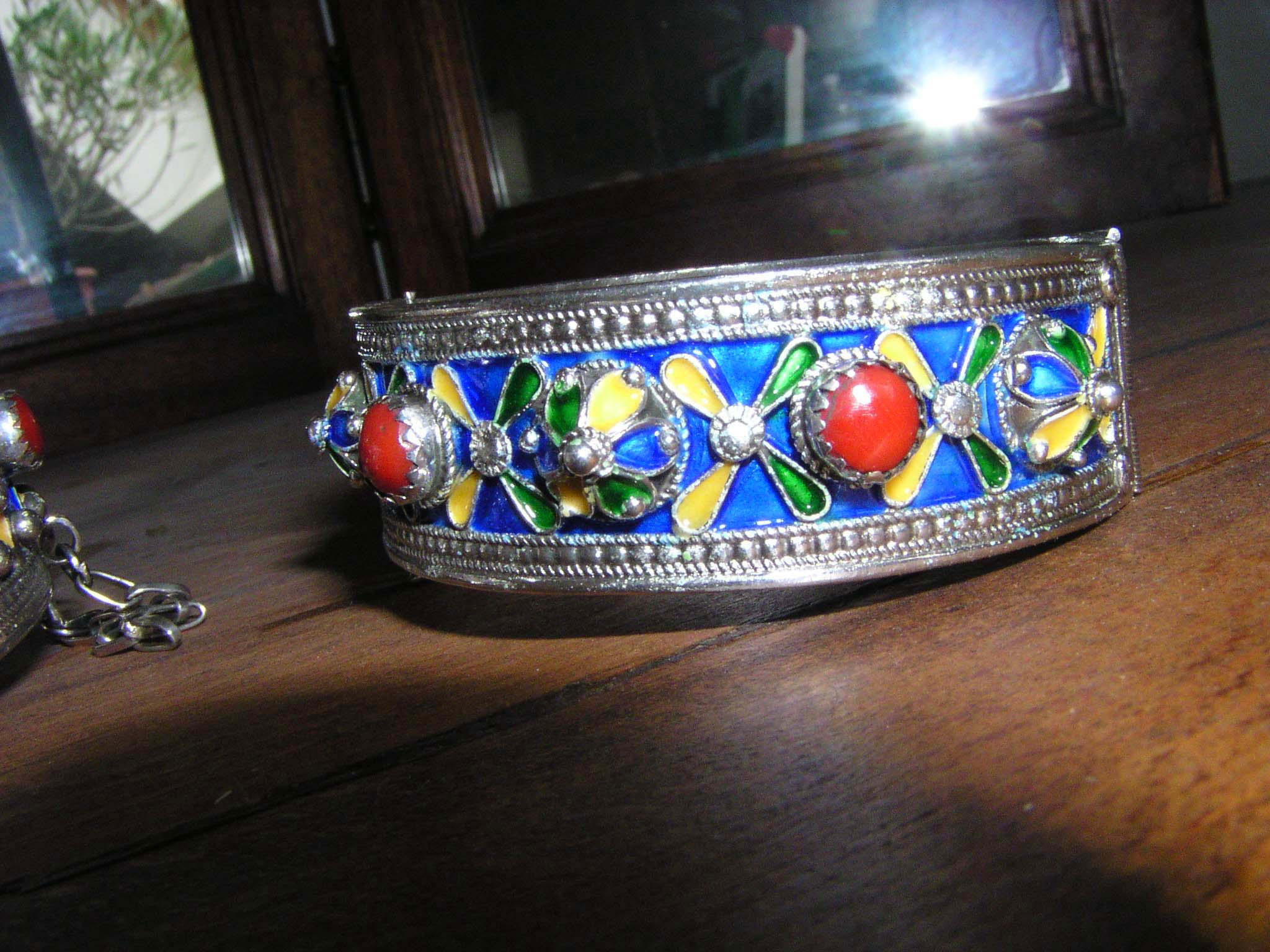 BijouKabyle2.jpg